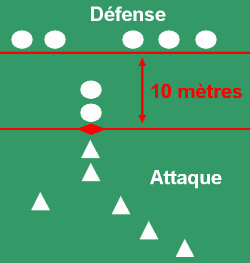 le hors-jeu sur un tenu au rugby à XIII